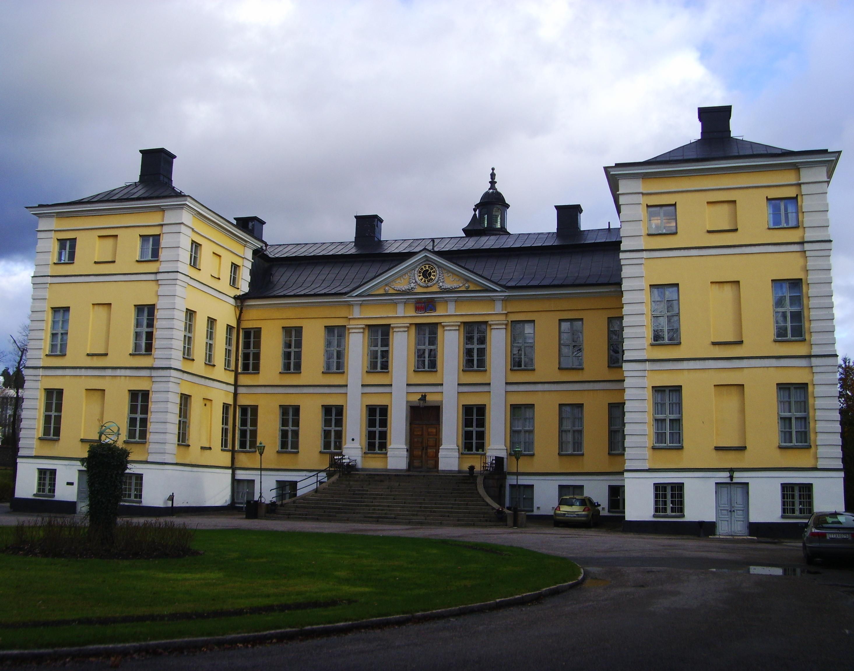 Finspångs slott